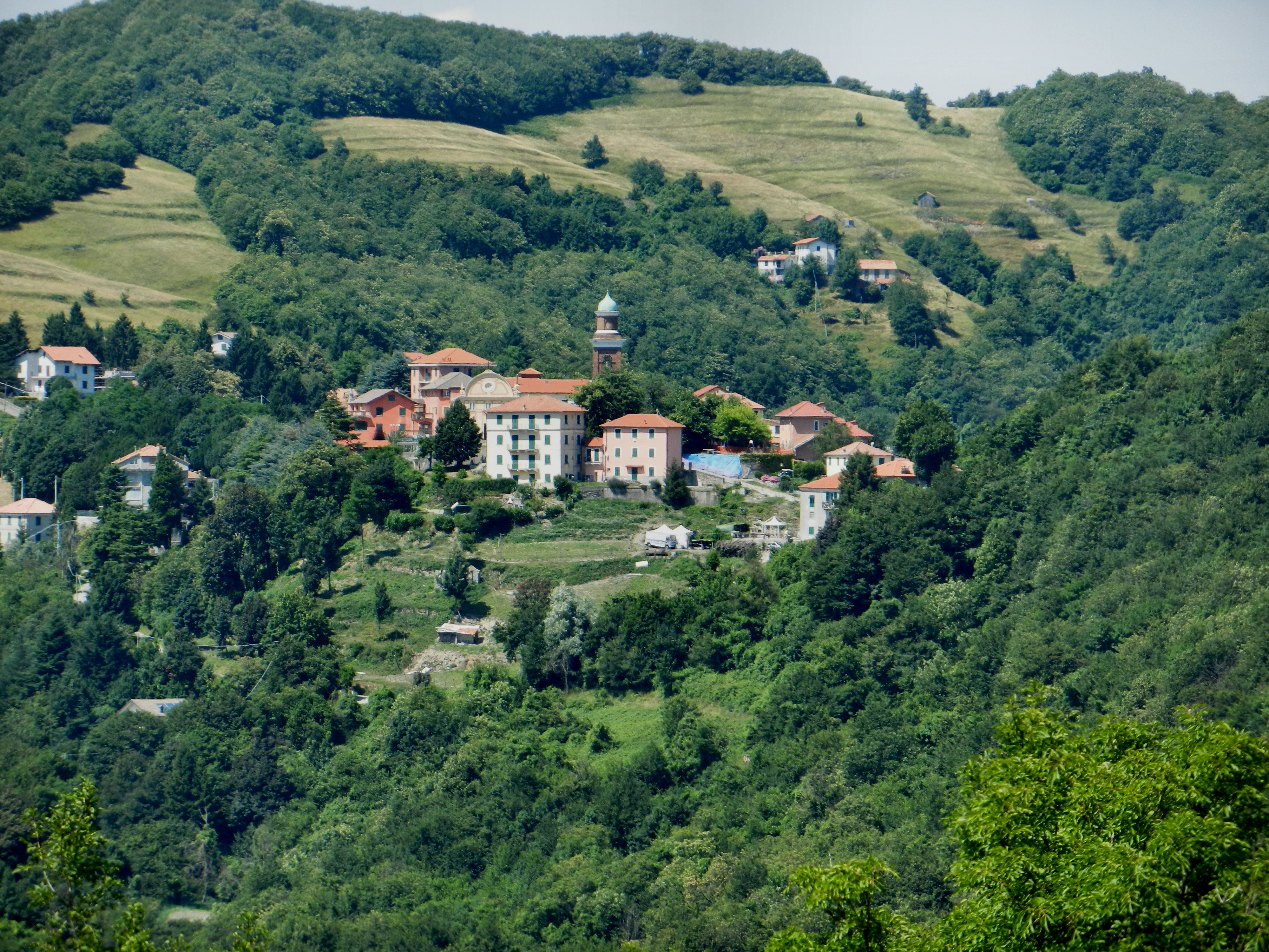 Mignanego, città metropolitana di Genova, la frazione Santuario della Vittoria